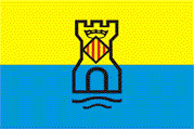 Bandera oficial de Castelldefels (Barcelona, España)